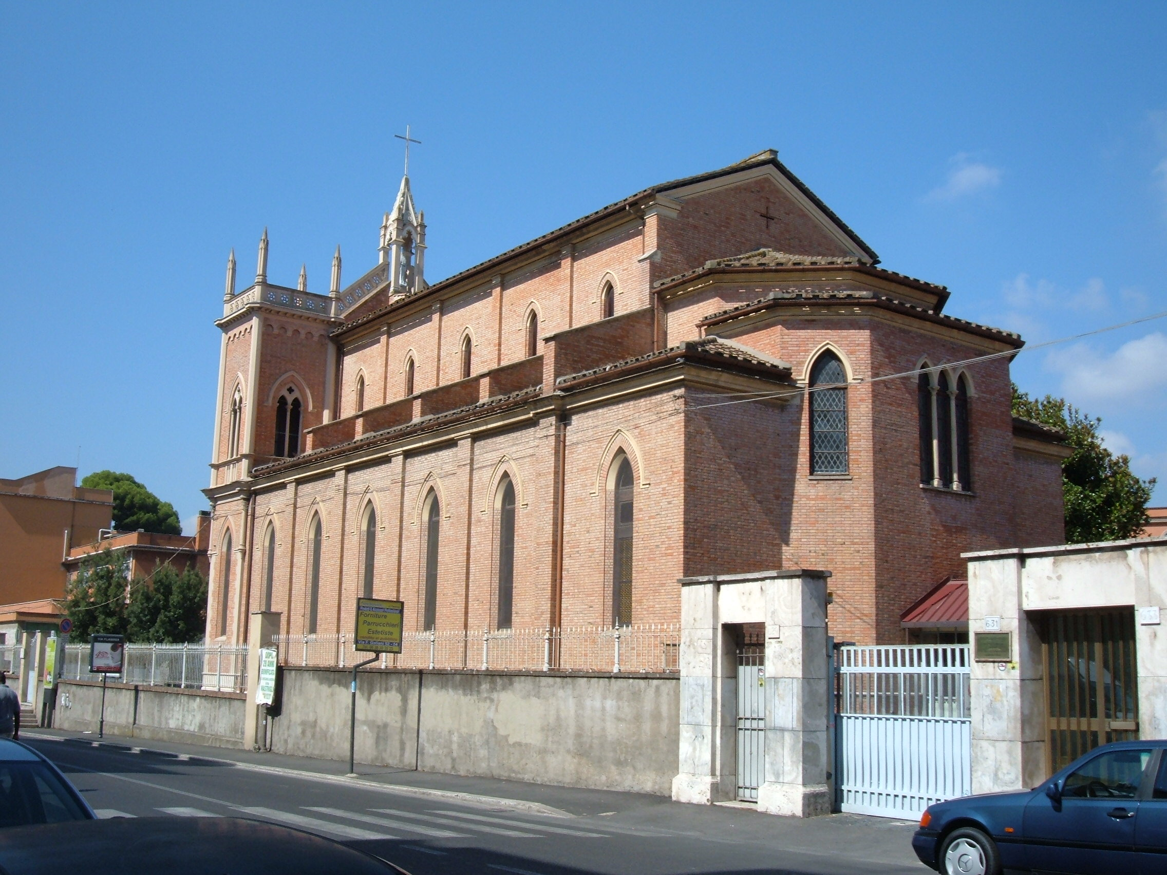 Chiesa di Santa Maria Addolorata, annessa all'Istituto scolastico Gesù e Maria, a Roma, in via Flaminia, nel quartiere Tor di Quinto.